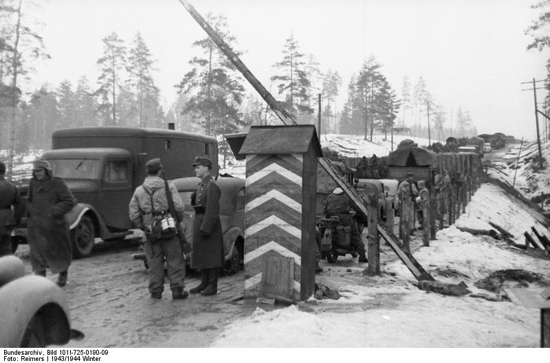 Scherl: Auf einer Verbindungsstraße zwischen Ilmensee und Finnischem Meerbusen Im Zuge der Frontverkürzung gehen Einheiten in planmäßiger Ordnung in die ihnen neu zugewiesenen Stellungen. Achtung! PK-Aufnahme Kriegsberichter Reimers 28.2.44 [Herausgabedatum] Zentralbild: II. Weltkrieg 1939-45 An der Front in der Sowjetunion. Ende Februar 1944. Bei der sowjetischen Offensive zur Befreiung des Leningrader Gebietes Januar-März 1944 räumen die deutschen Truppen das ganze Gebiet zwischen Ilmensee und Finnischem Meerbusen bis zum Peipus-See.